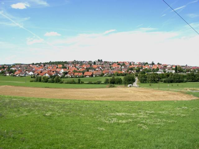 Ortbild von Raidwangen (Ortsteil von Nürtingen) Author: User:Raidwangen